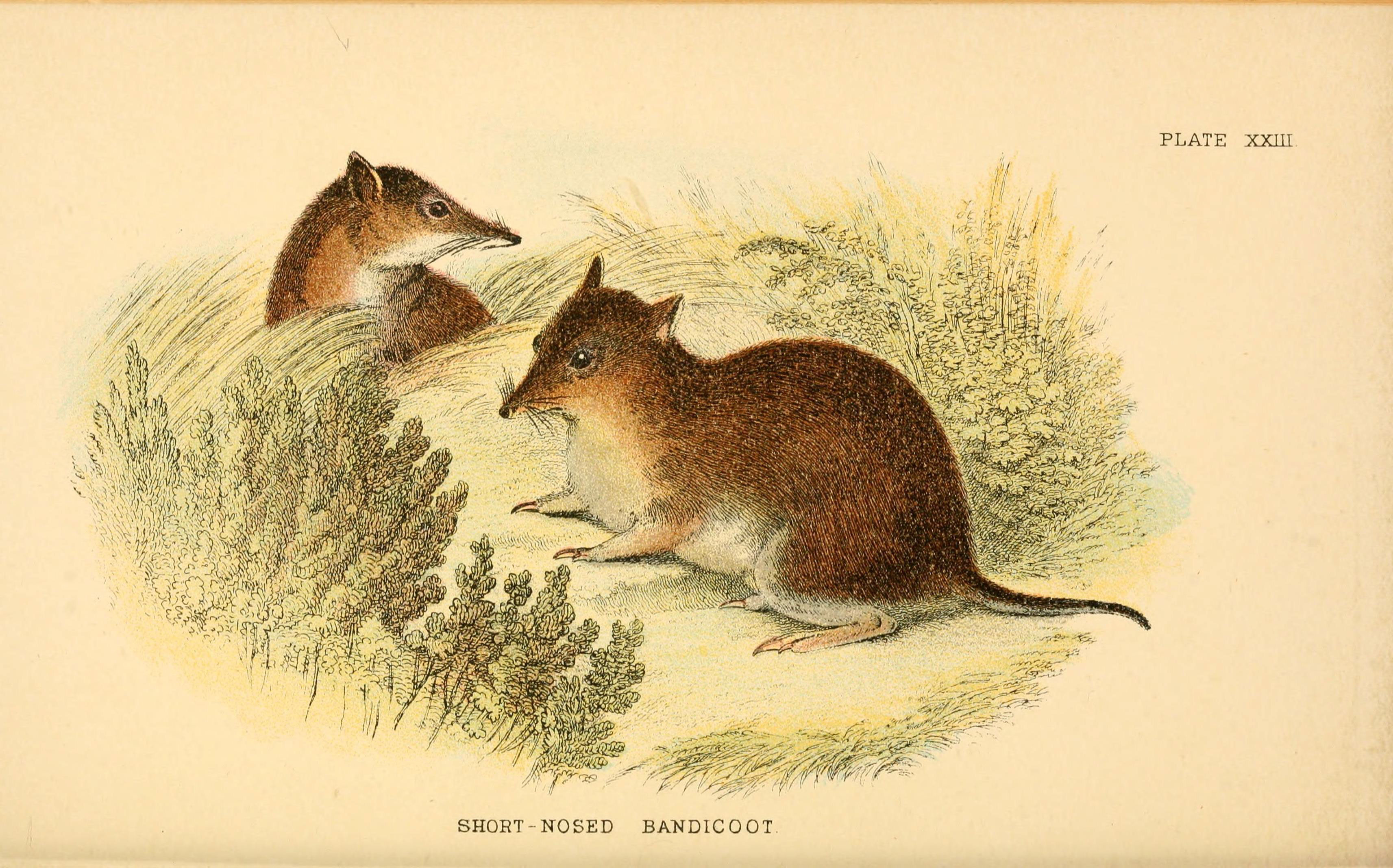 V\^.v. %sC" EH o o o Q p w en o I o K